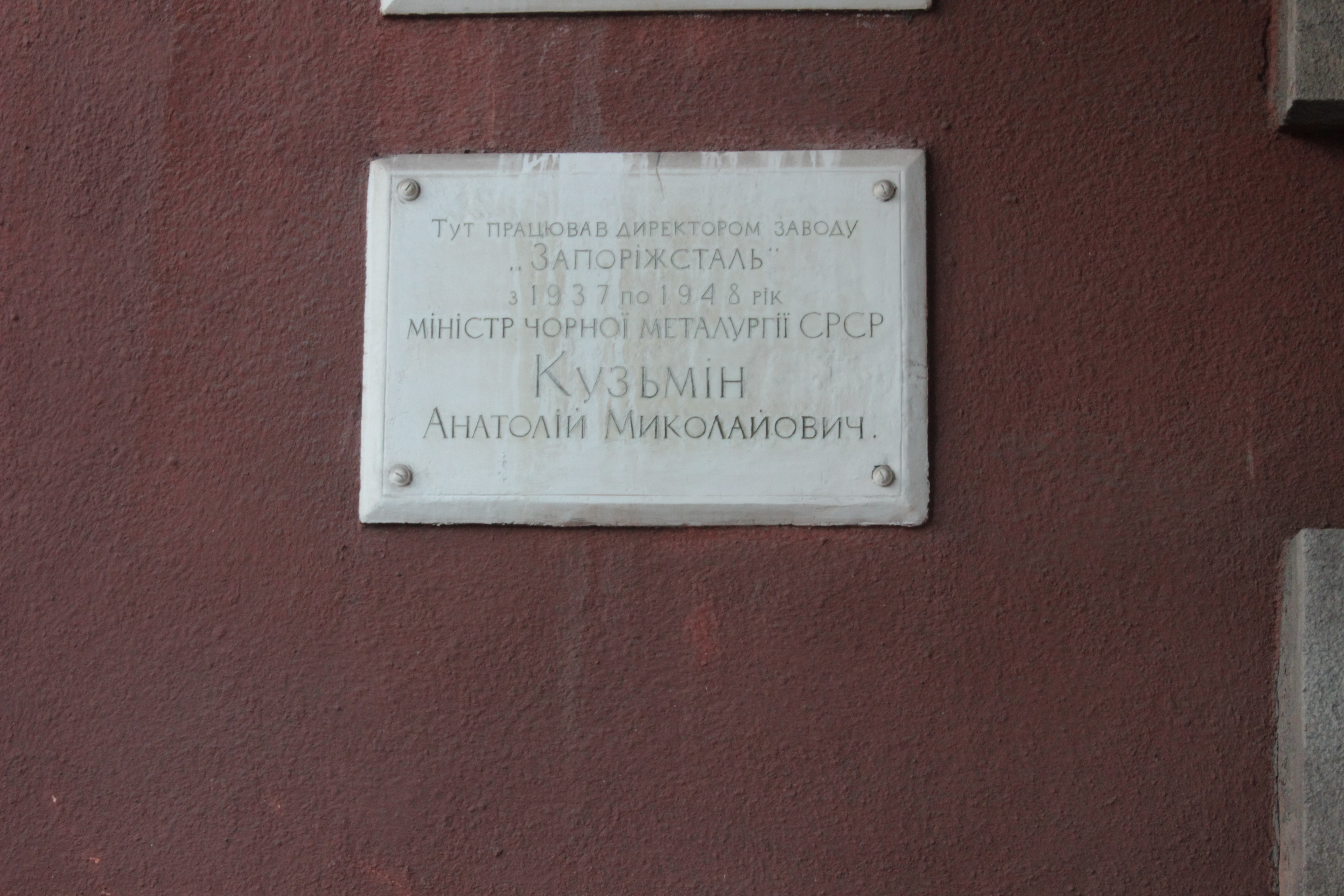 Будинок заводоуправління заводу "Запоріжсталь", в якому перебував Орджонікідзе Г. К. та працював Кузьмін А. М., Запоріжжя, Південне шосе, 72